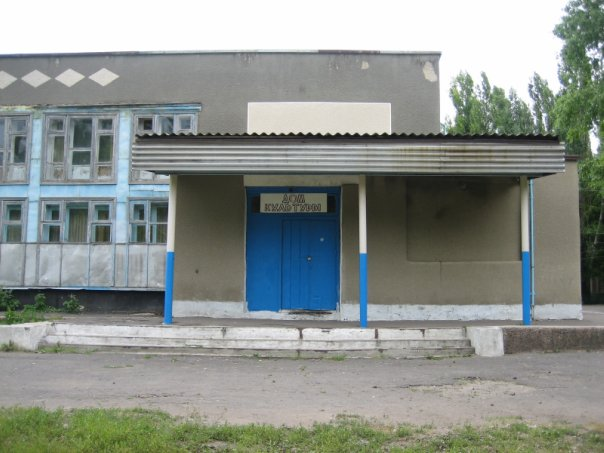 В этом здании состоятся праздники,концерты,дискотеки!Так же проводятся деловые мероприятия(совещания,выборы и т.д)